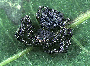 male Phrynarachne ceylonica from Okinawa.